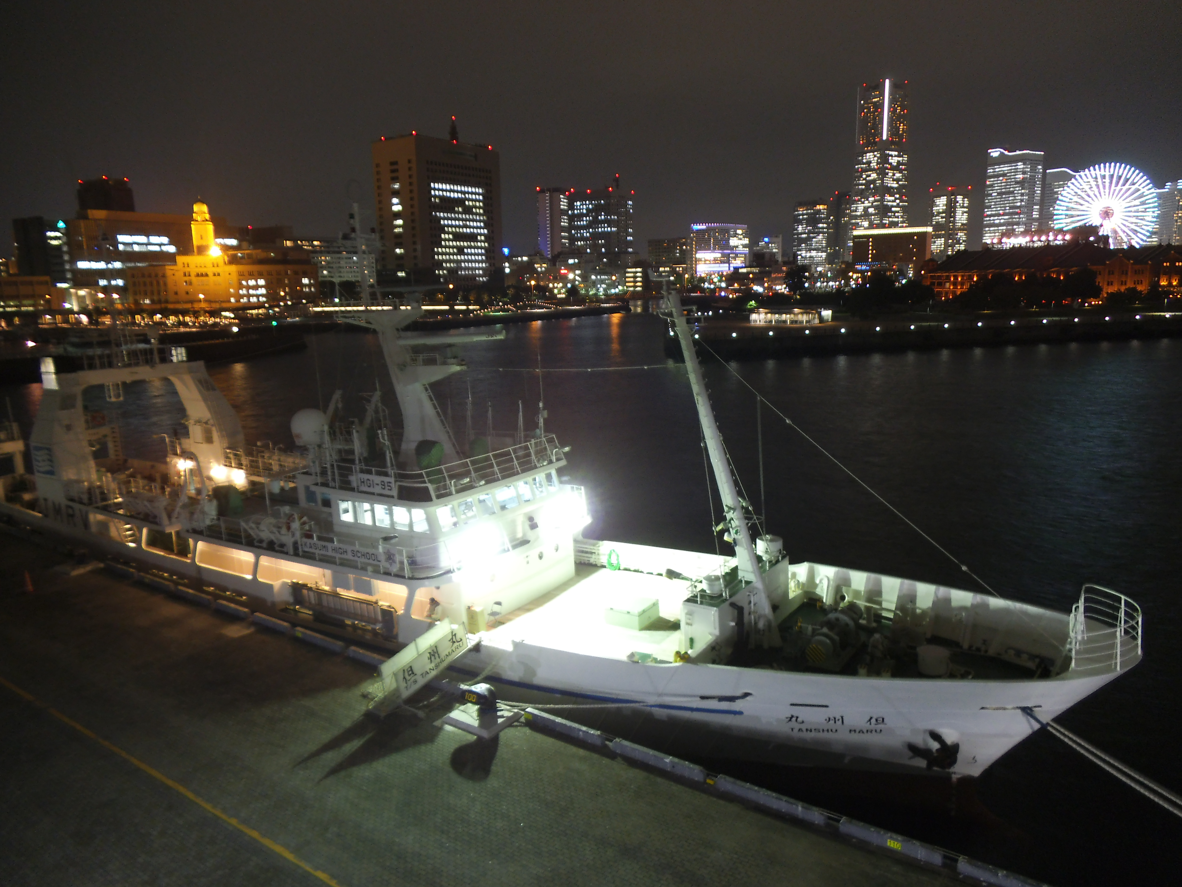 兵庫県立香住高等学校の練習船但州丸(5代目）、夜の横浜港にて